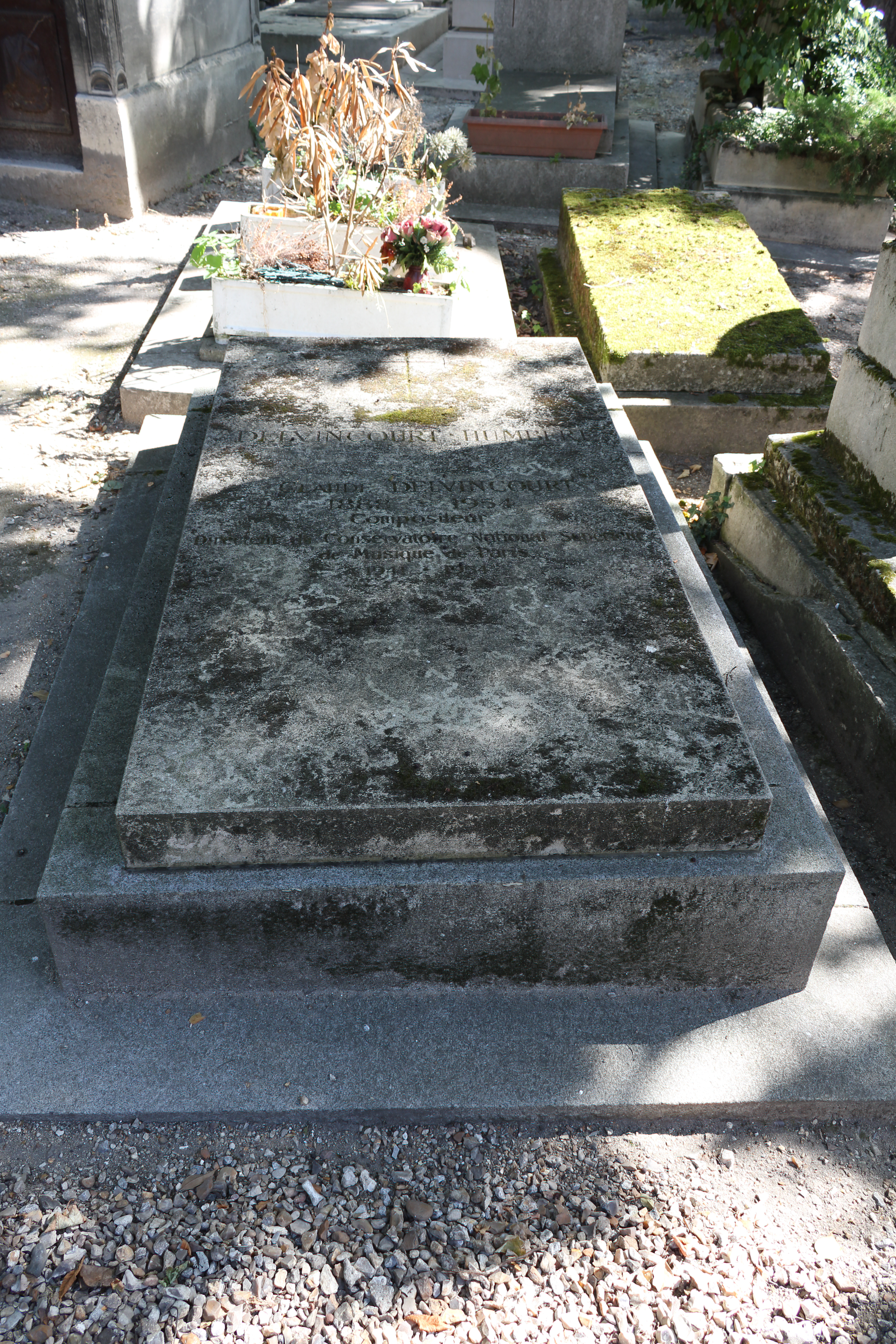 Vue d'ensemble